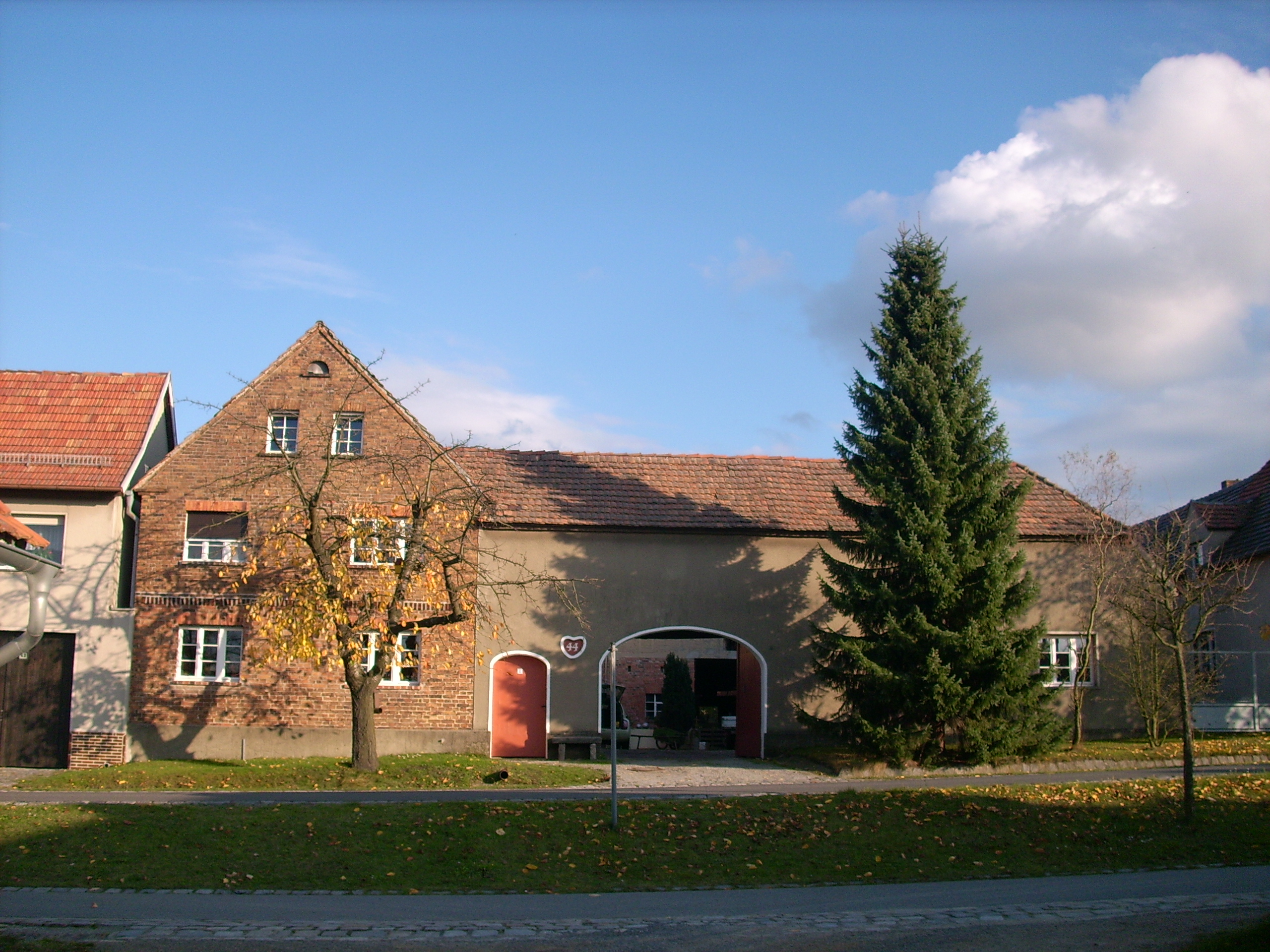 Gehöft, Hauptstraße 44 in Bröthen, Ortsteil von Hoyerswerda